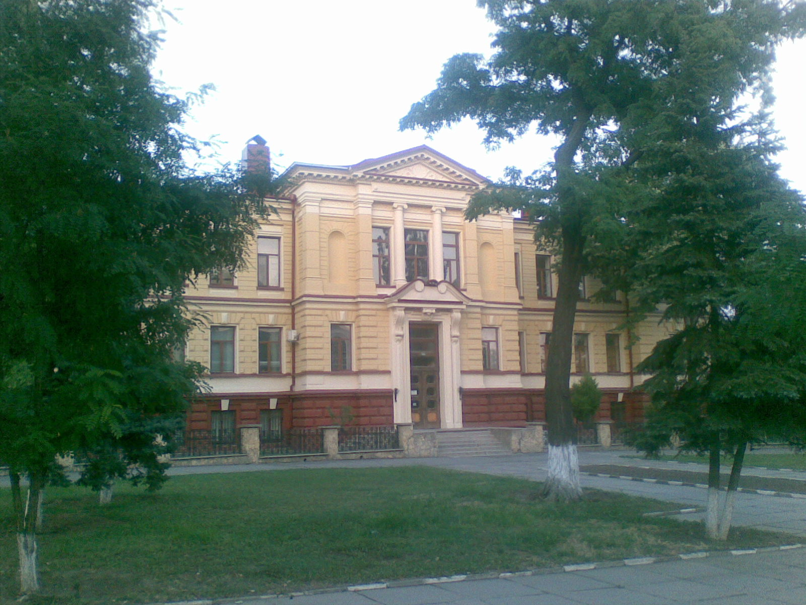 Kraeznavchyi_muzey_Kherson.jpg: Херсонський обласний краєзнавчий музей